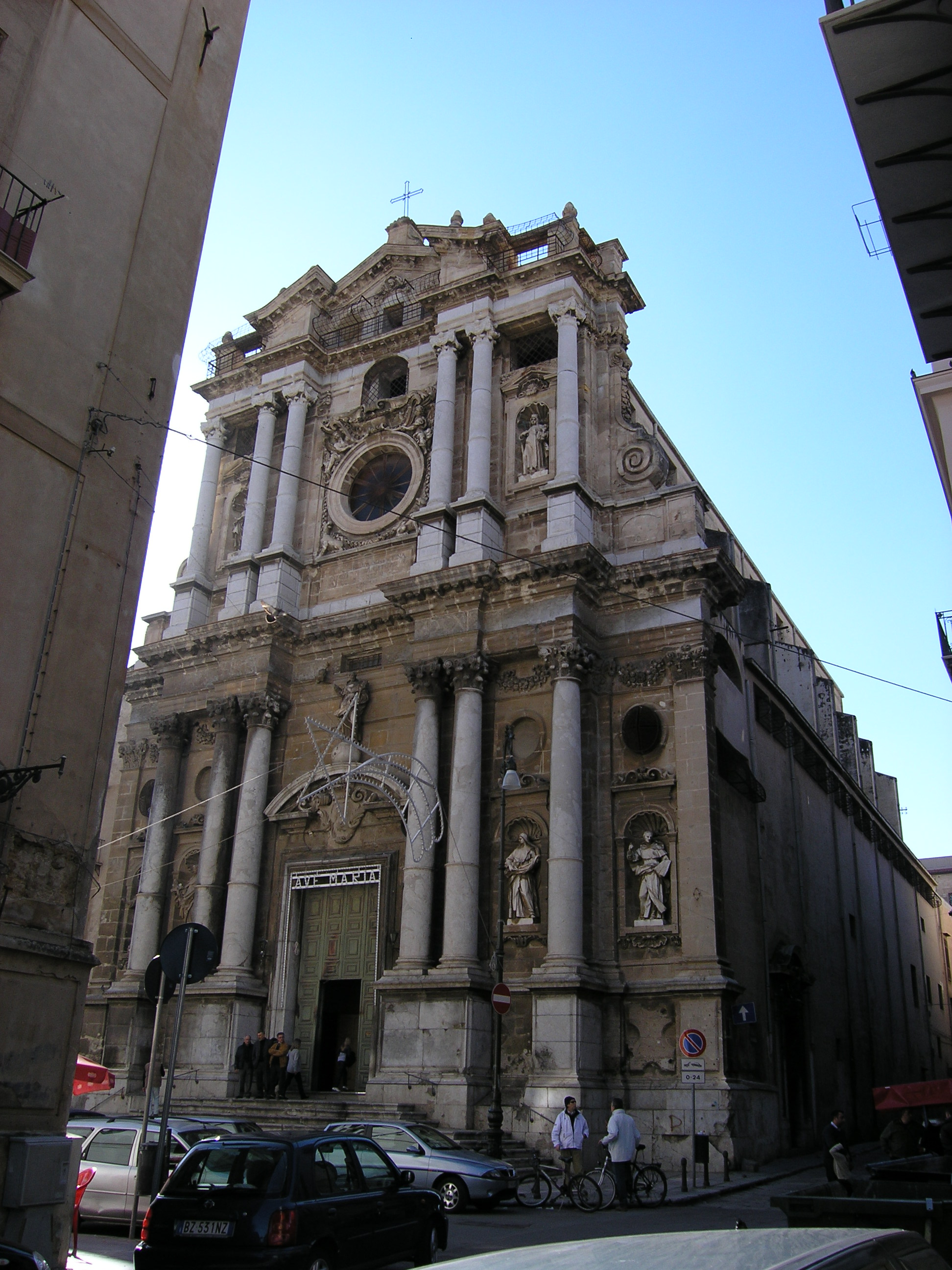 Sicilianu: Crèsia di Santa Marìa dâ Piatati